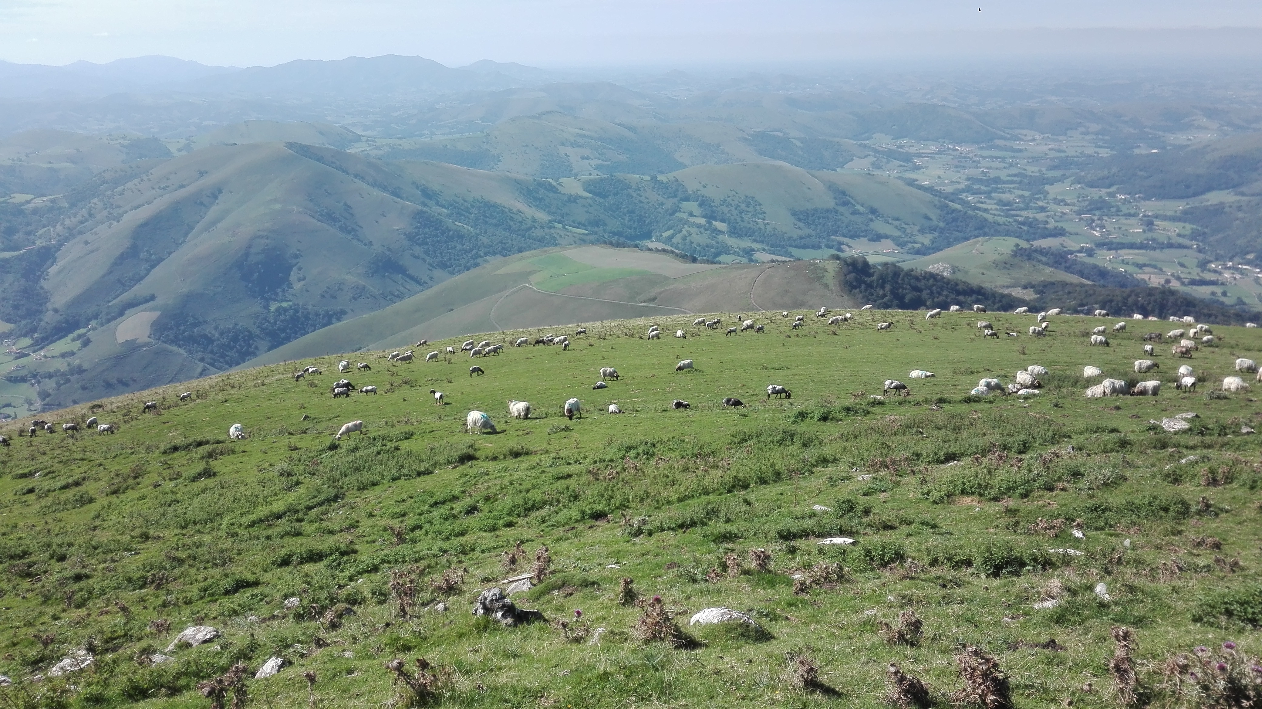 Estive sur le Mont de Belchou, à 1129 mètres d'altitude, massif des Arbailles, au Pays Basque, Pyrénnées-Atlantiques, France. Brebis et béliers Manech à tête rousse.